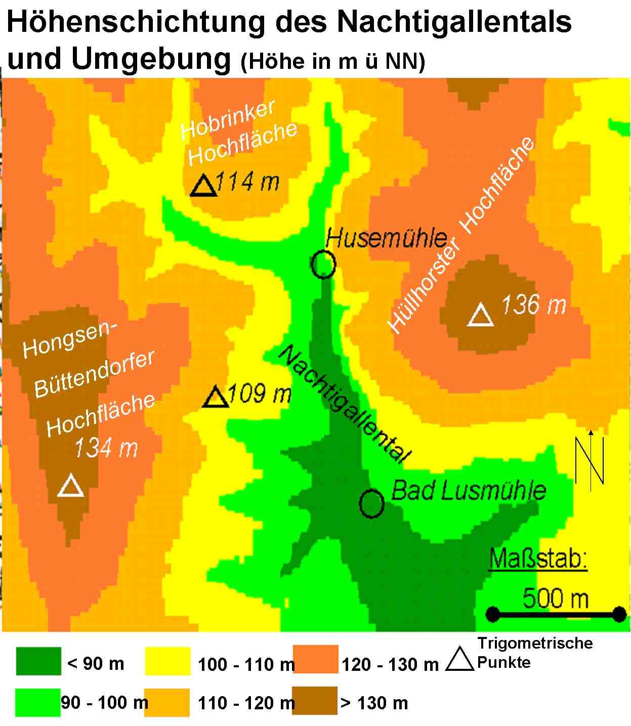 Karte des Nachtigallentals